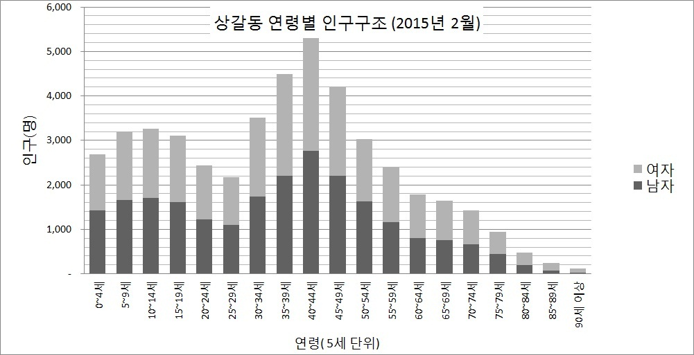 용인시 상갈동 연령별 인구구조(2015년 2월 기준)